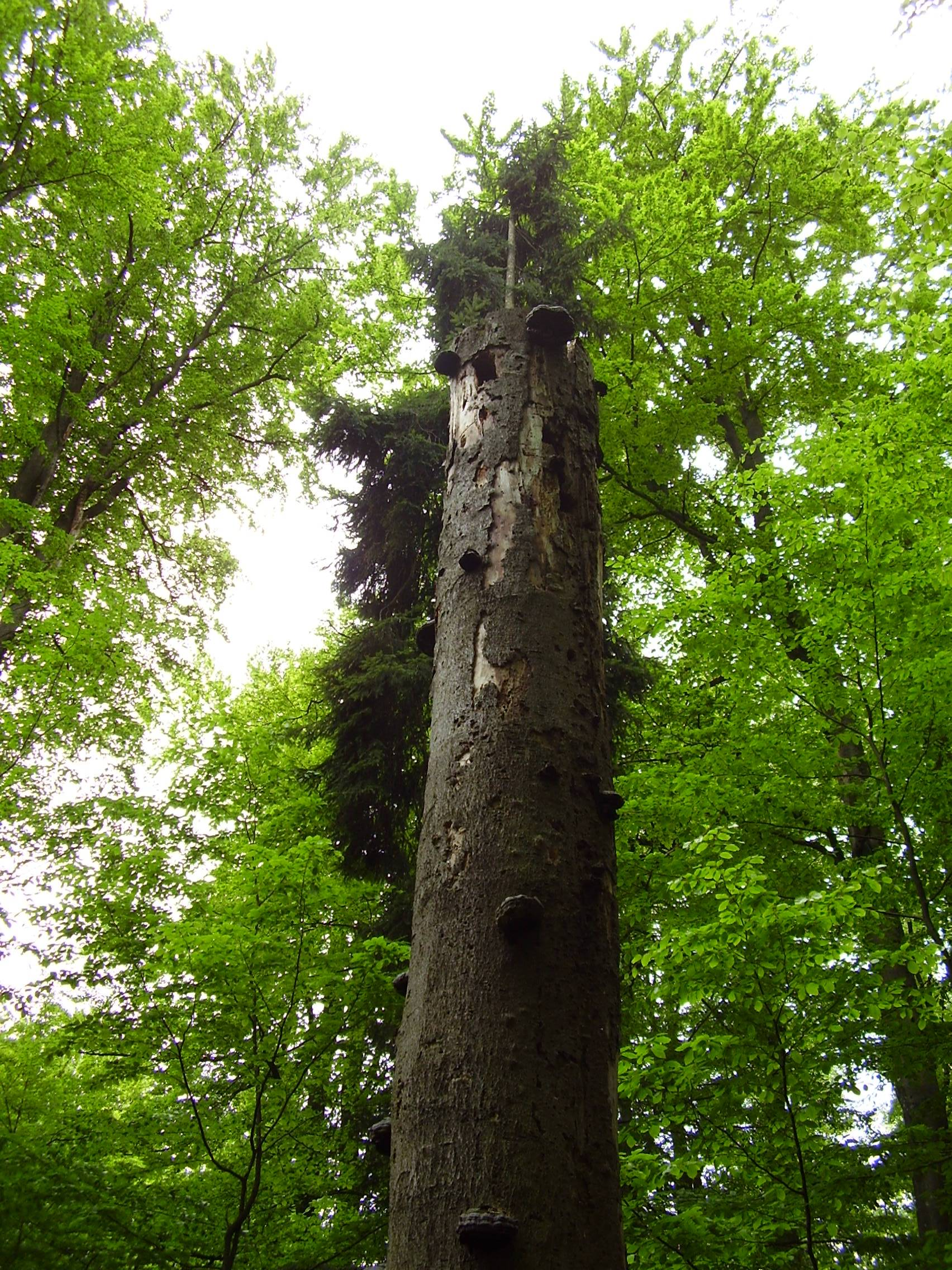 Starý buk s chorošem